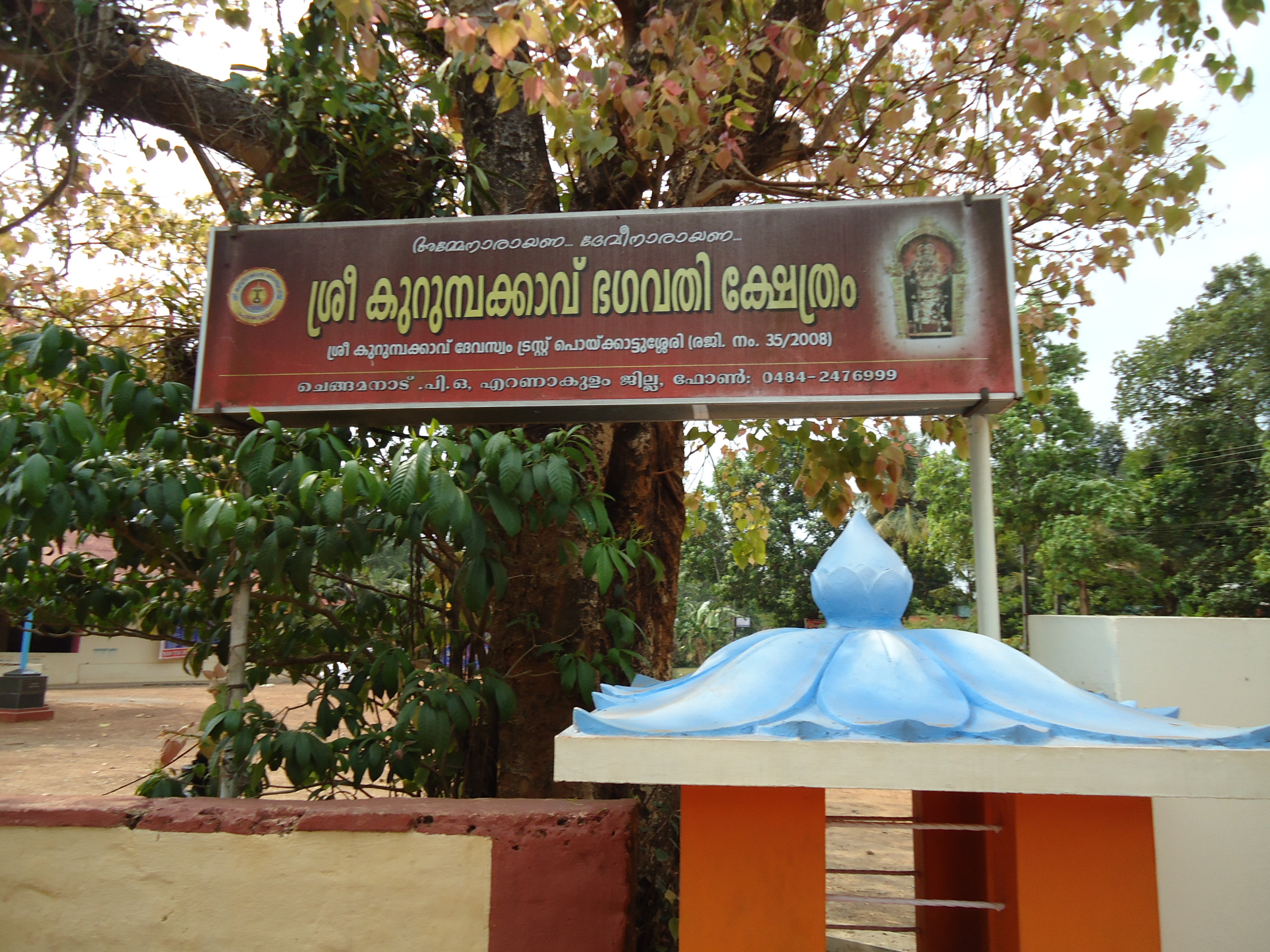 Sree Kurumbakkavu Bhagavathi Temple Poykkattussery Board